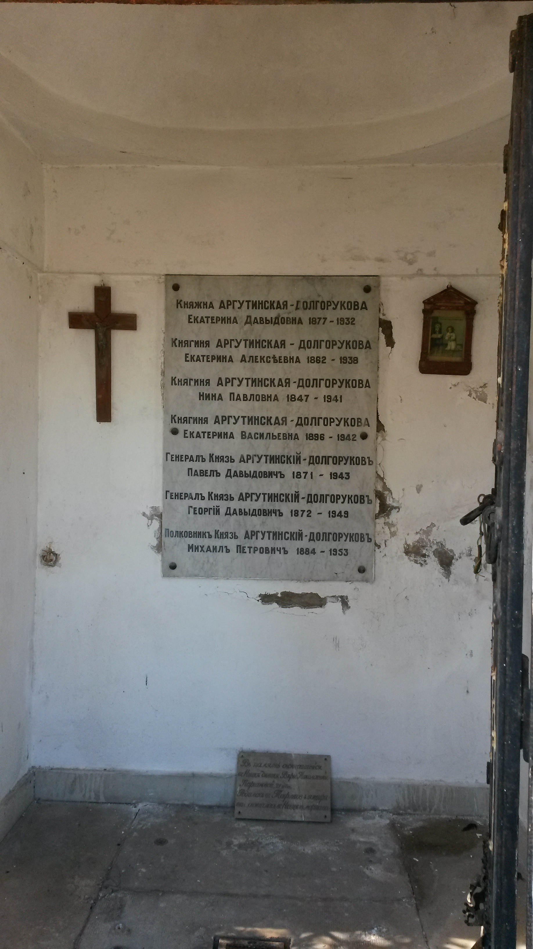 Семейный склеп Аргутинских-Долгоруковых на Русском кладбище в Ницце